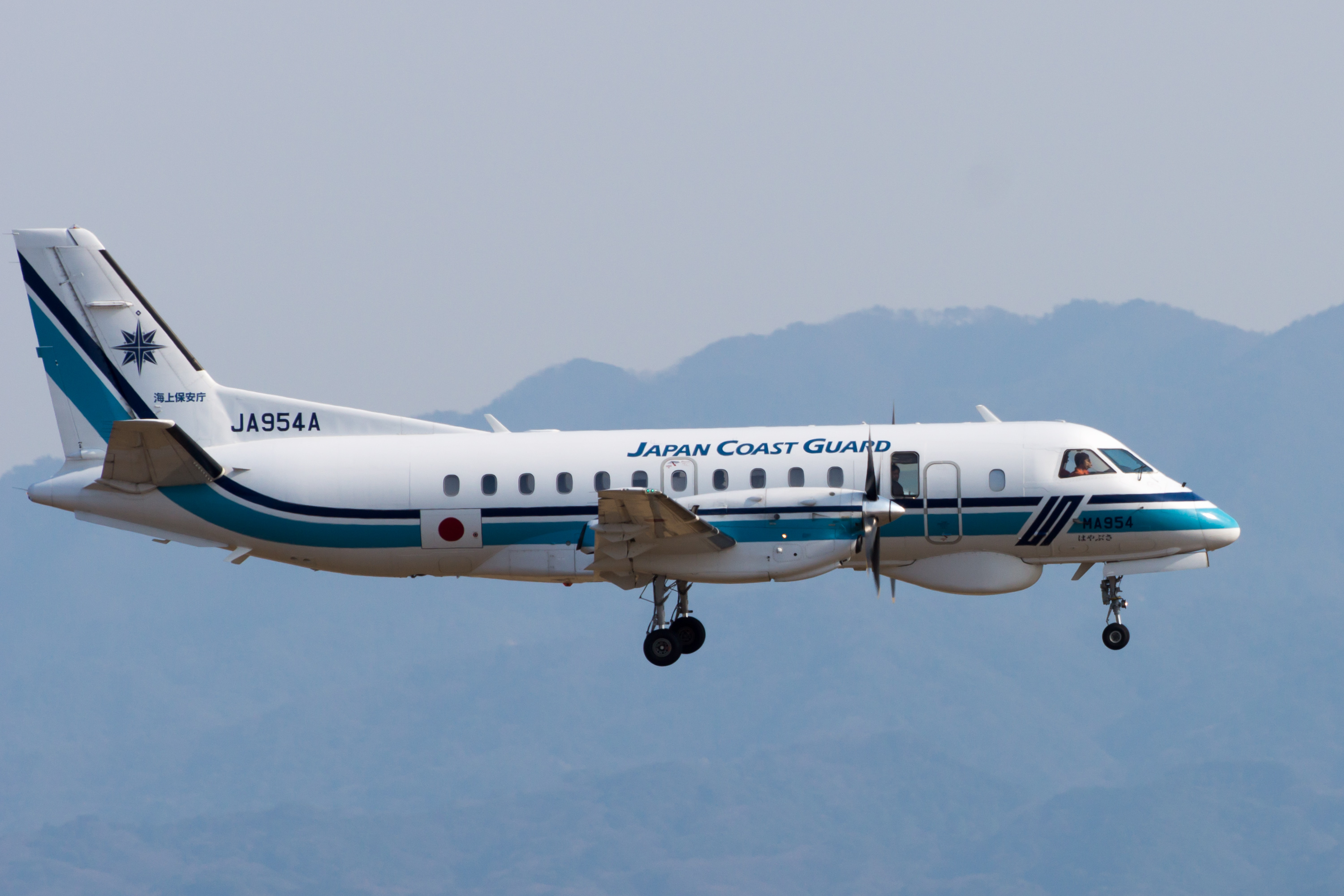 Japan Coast Guard Saab 340B